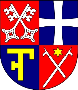 Wappen Bistum/Erzbistum Berlin Ausschnitt